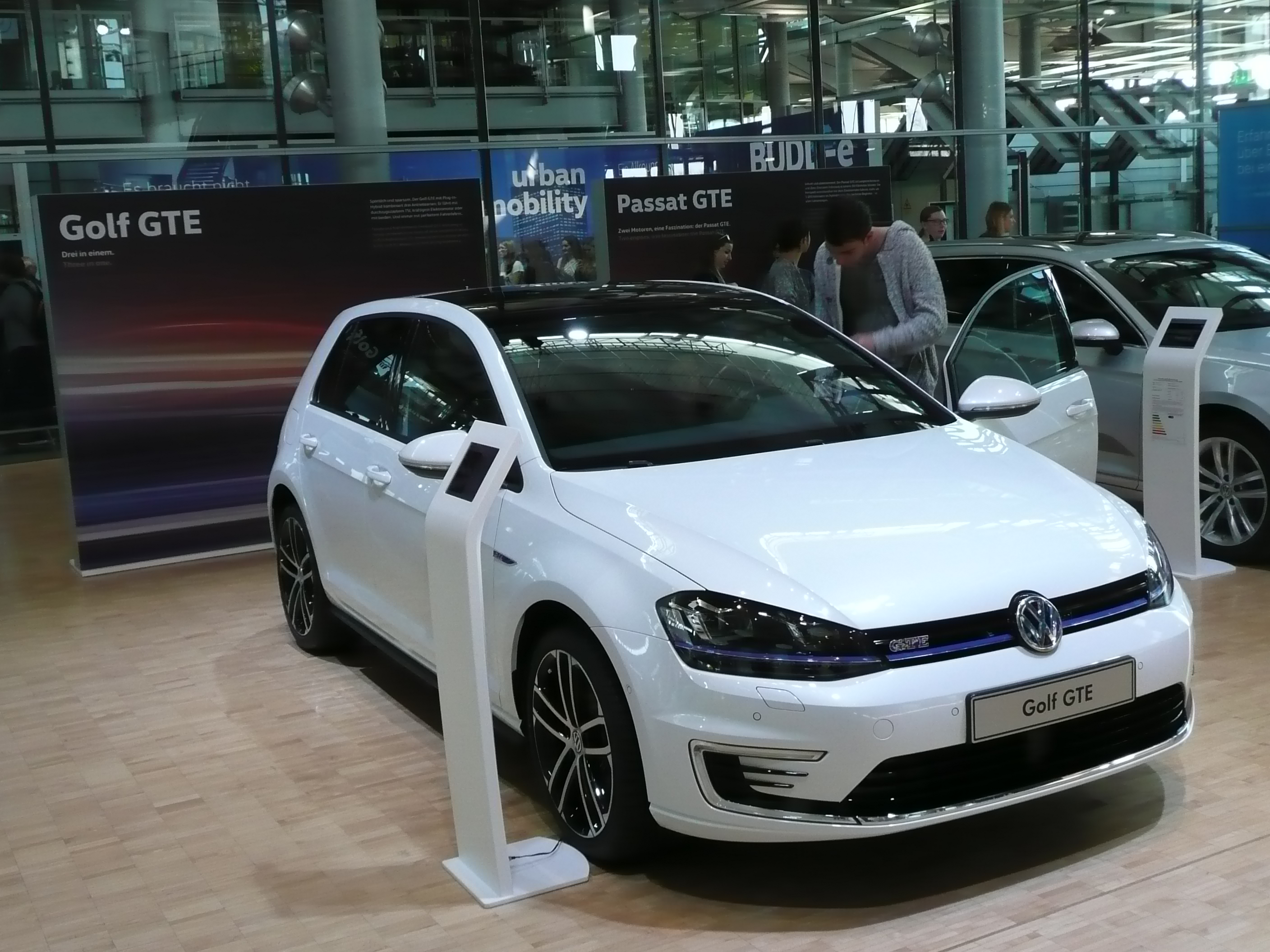 Golf GTE, ausgestellt in der Gläsernen Manufaktur